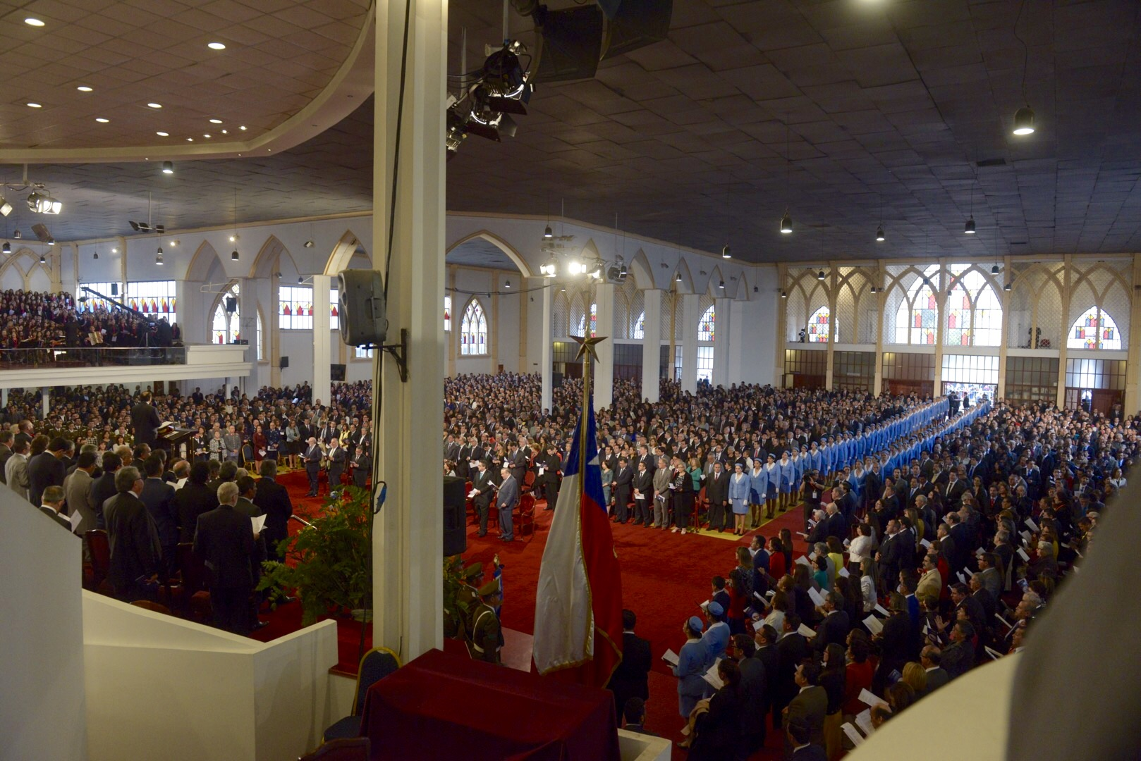 11 Septiembre 2016, Ministro Marcelo Díaz participa en Servicio de Acción de Gracias de la Unión de Iglesias Evangélicas de Chile.